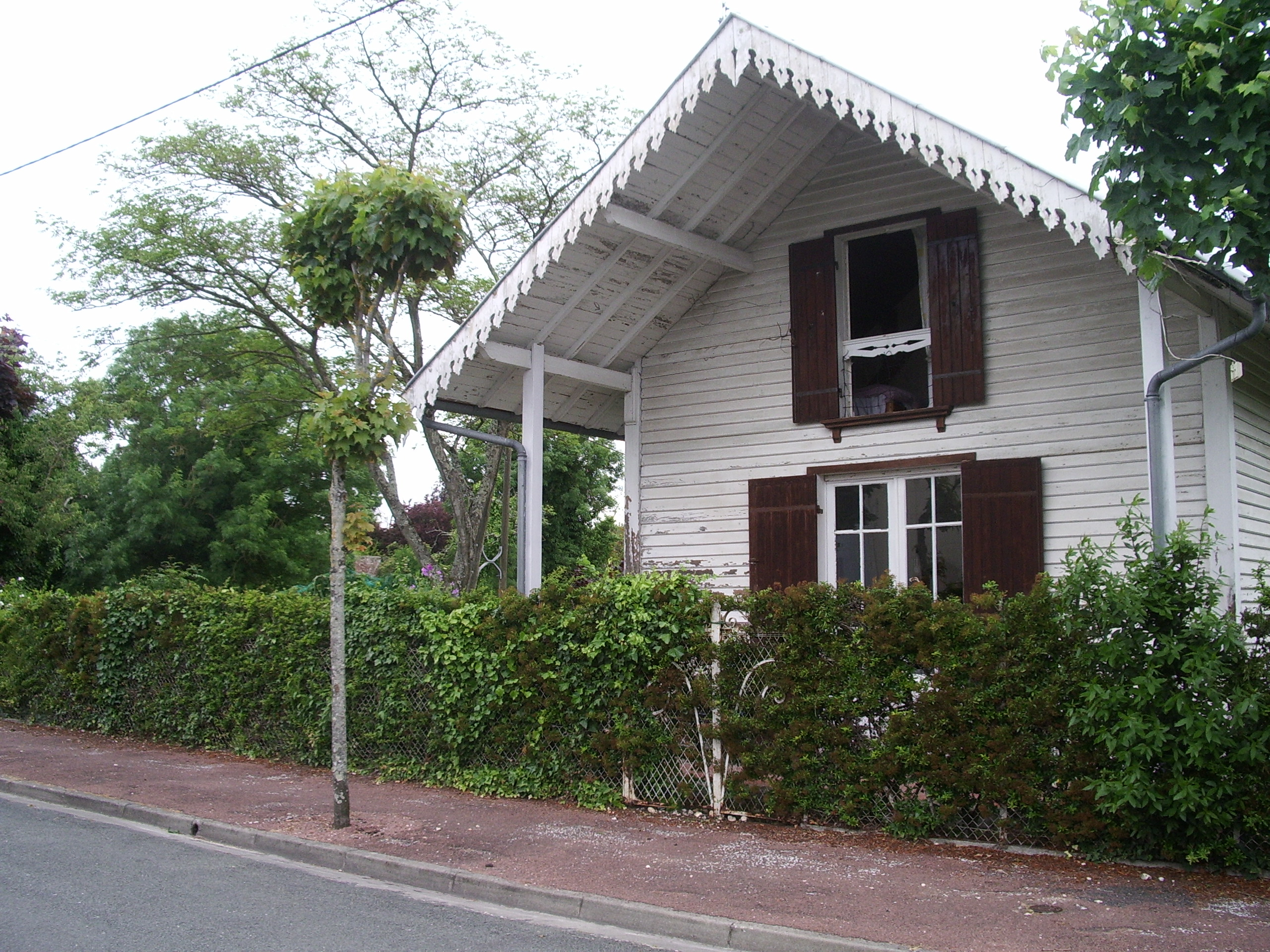 Chalet de l'avenue Sorignet, Etaules, Charente-Maritime, France.